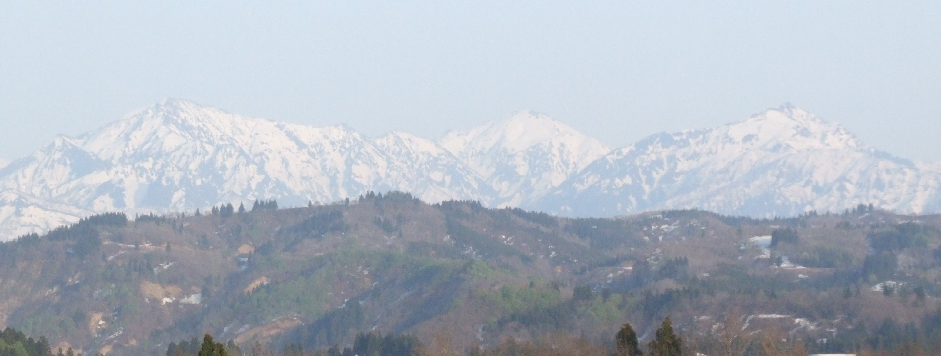 Echigo-Sanzan Look at Kanetsu-Highway-Echigokawaguchi IC.Apr 2006.